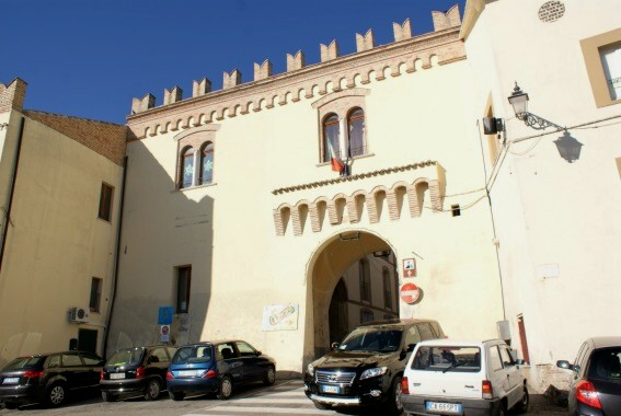 Portico in Piazza del Mercato, Castellalto.